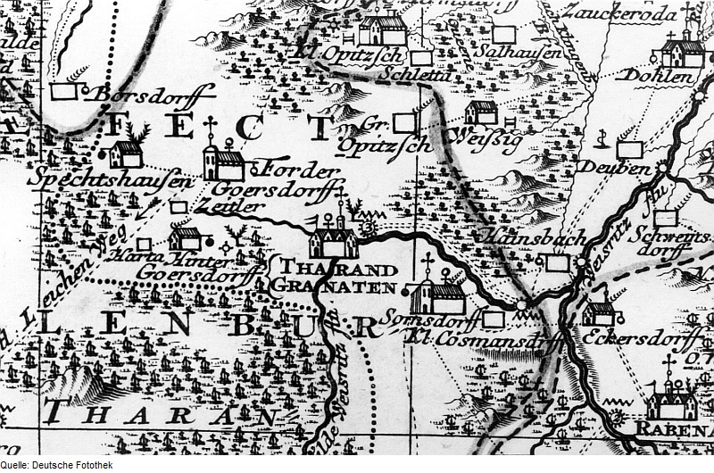 Original image description from the Deutsche FotothekTharandt. Seutter, Kirchenkreis Dresden, Mitte 18. Jh. (Sign.: VII 43)